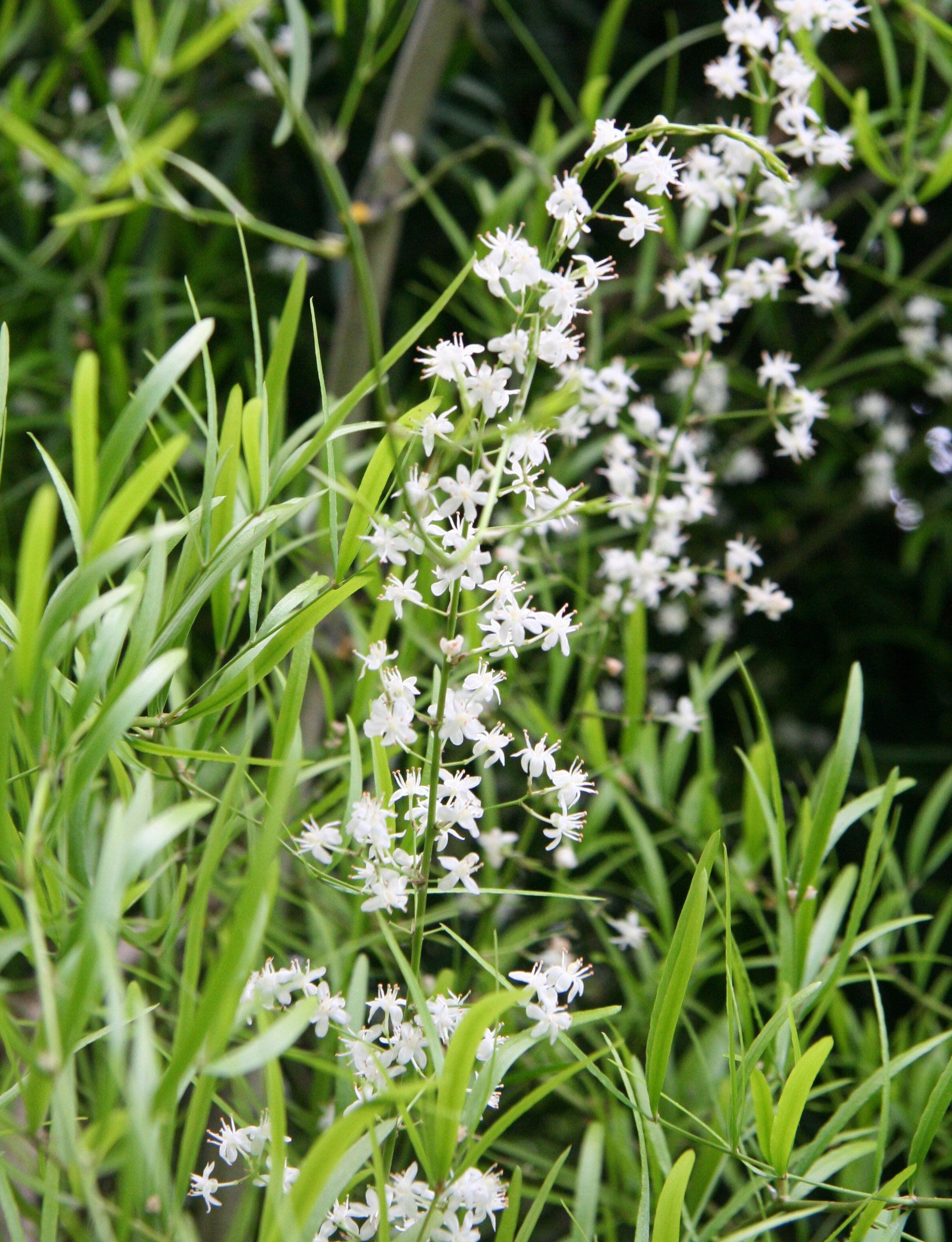 Asparagus falcatus im Botanischen Garten Dresden